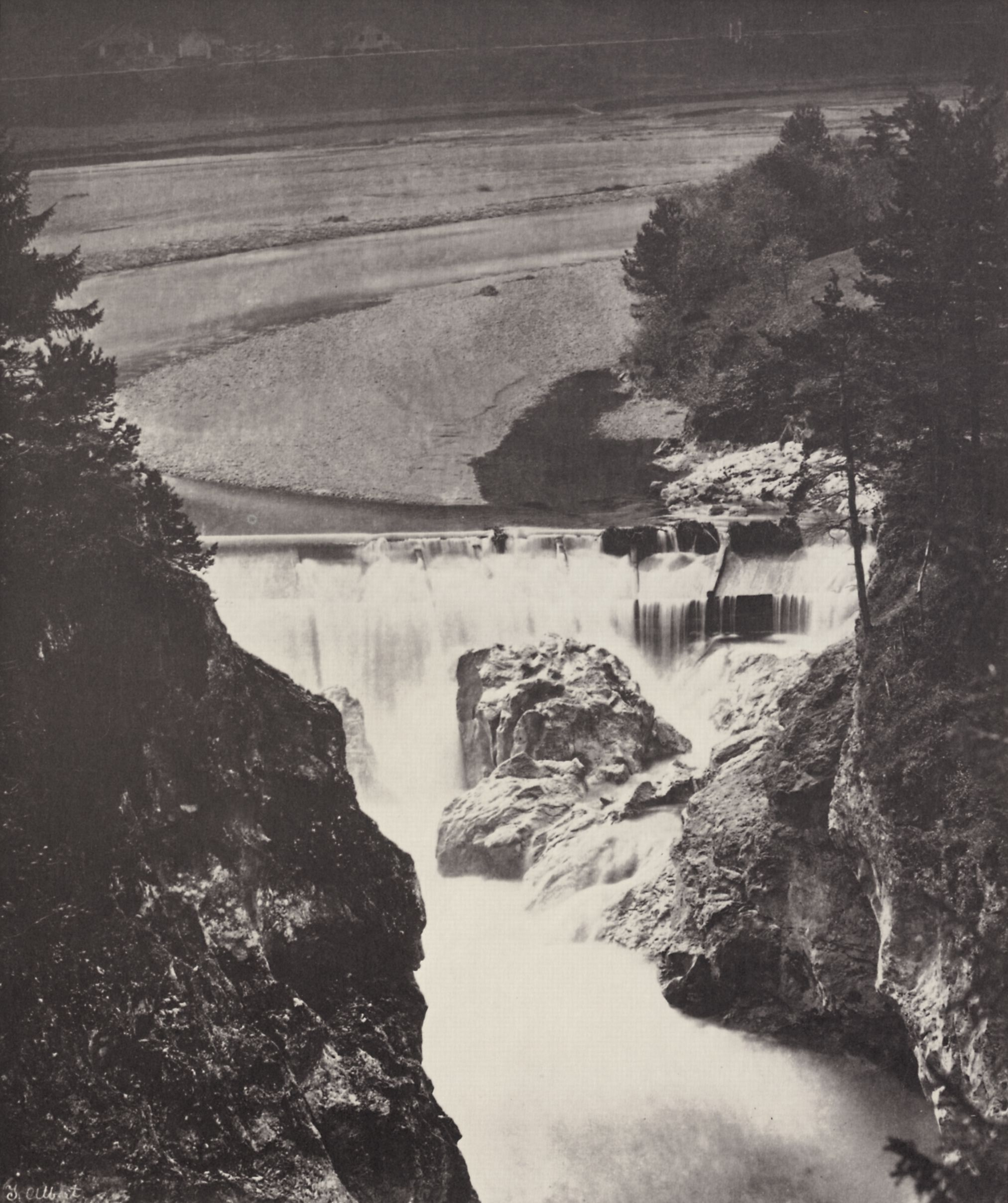 Originale Bildunterschrift: Der »St. Mang-Fall« bei Füssen. Fotografie, 319 x 268 mm